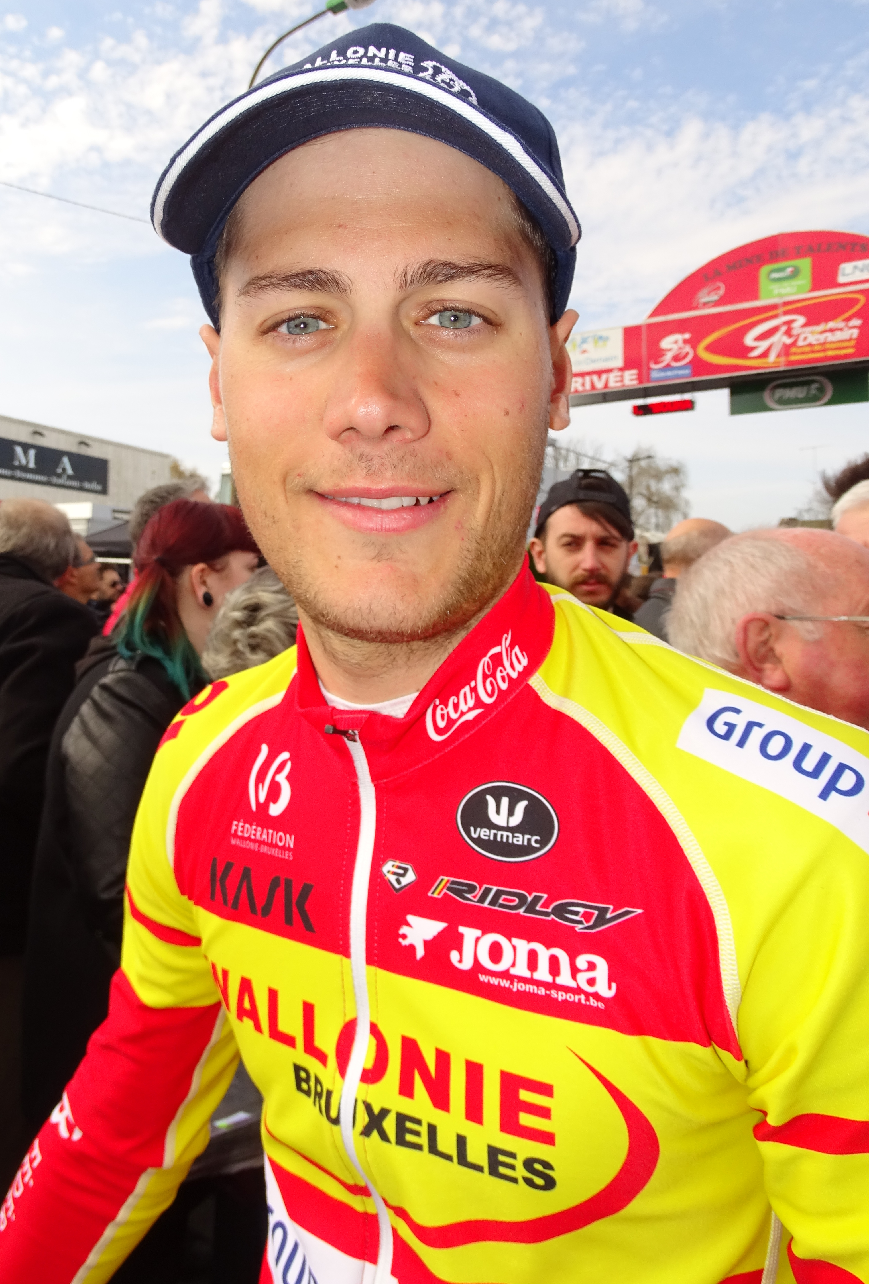 Reportage réalisé le jeudi 14 avril à l'occasion du départ et de l'arrivée du Grand Prix de Denain 2016 à Denain, Nord, Nord-Pas-de-Calais-Picardie, France.